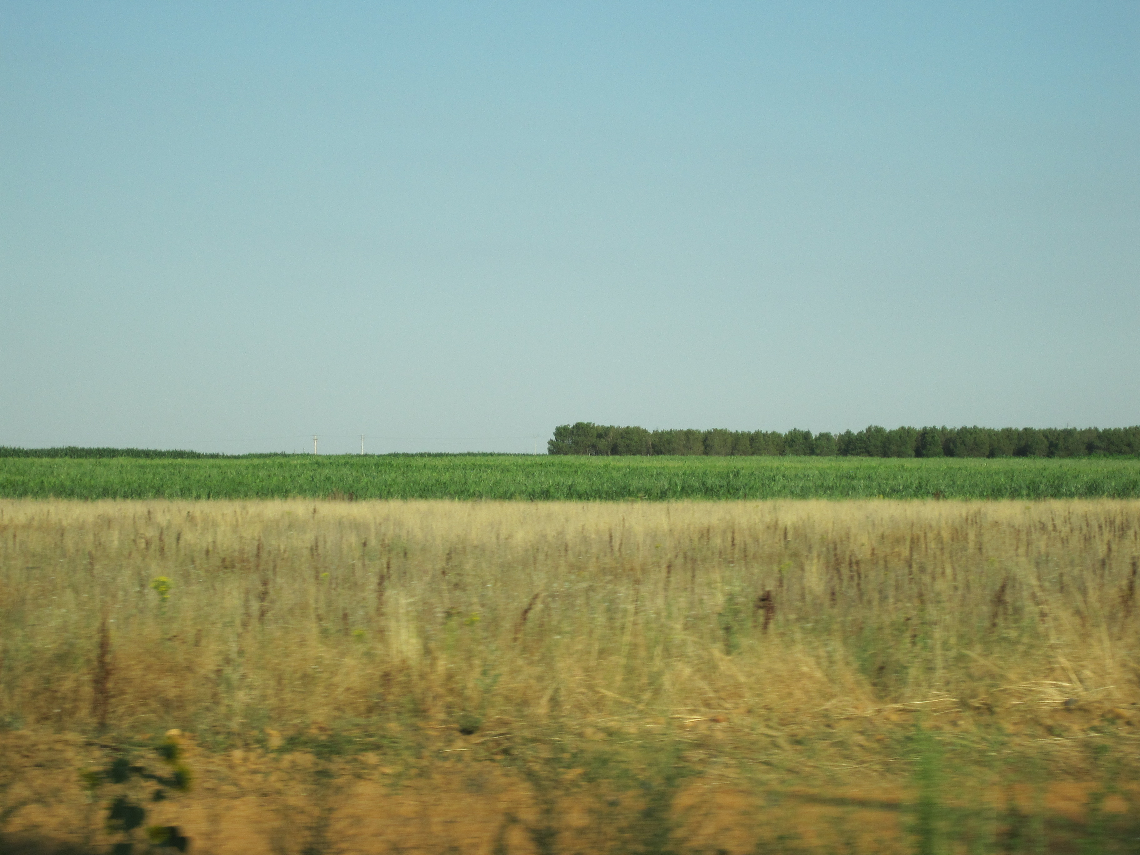 Vista de los terrenos de cultivo de Valdevimbre.